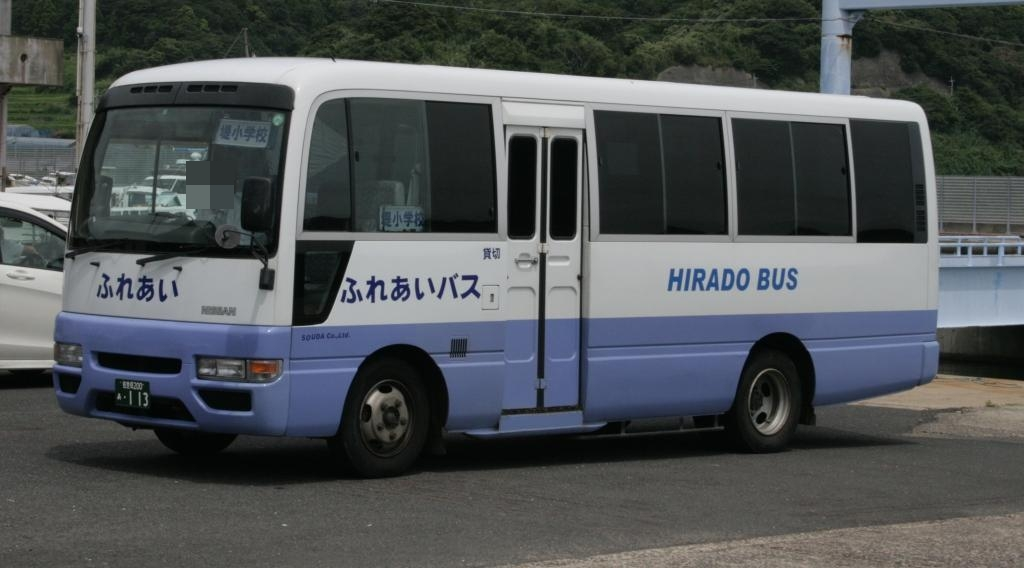 平戸ふれあいバス、YOKARO担当の車両。